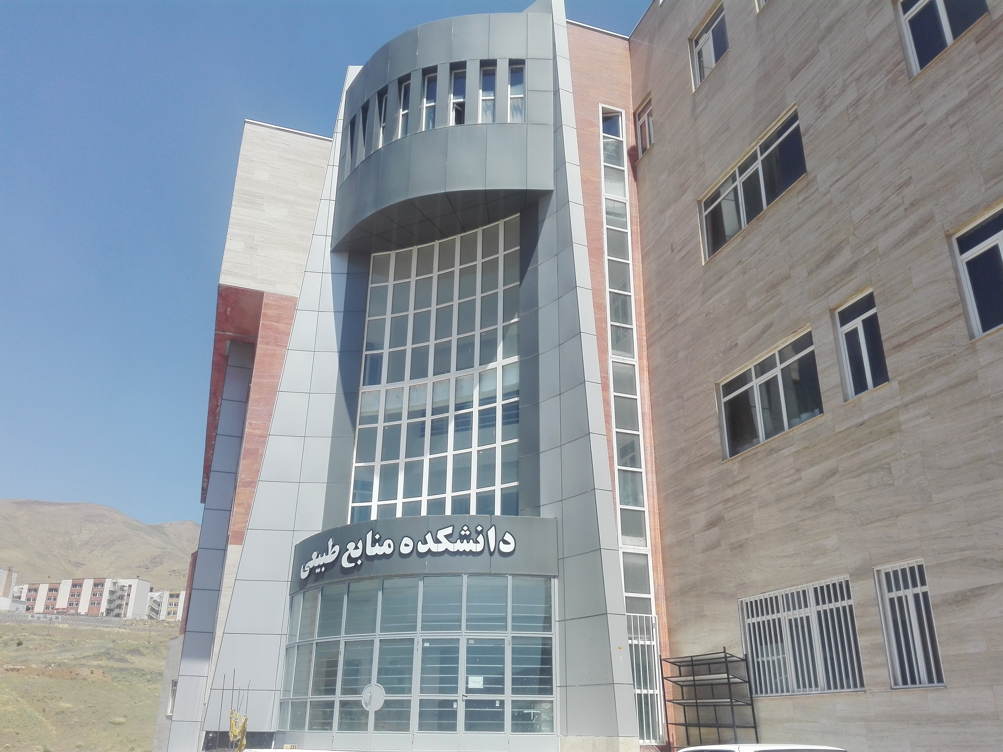 نمای بیرونی دانشکده منابع طبیعی دانشگاه کردستان